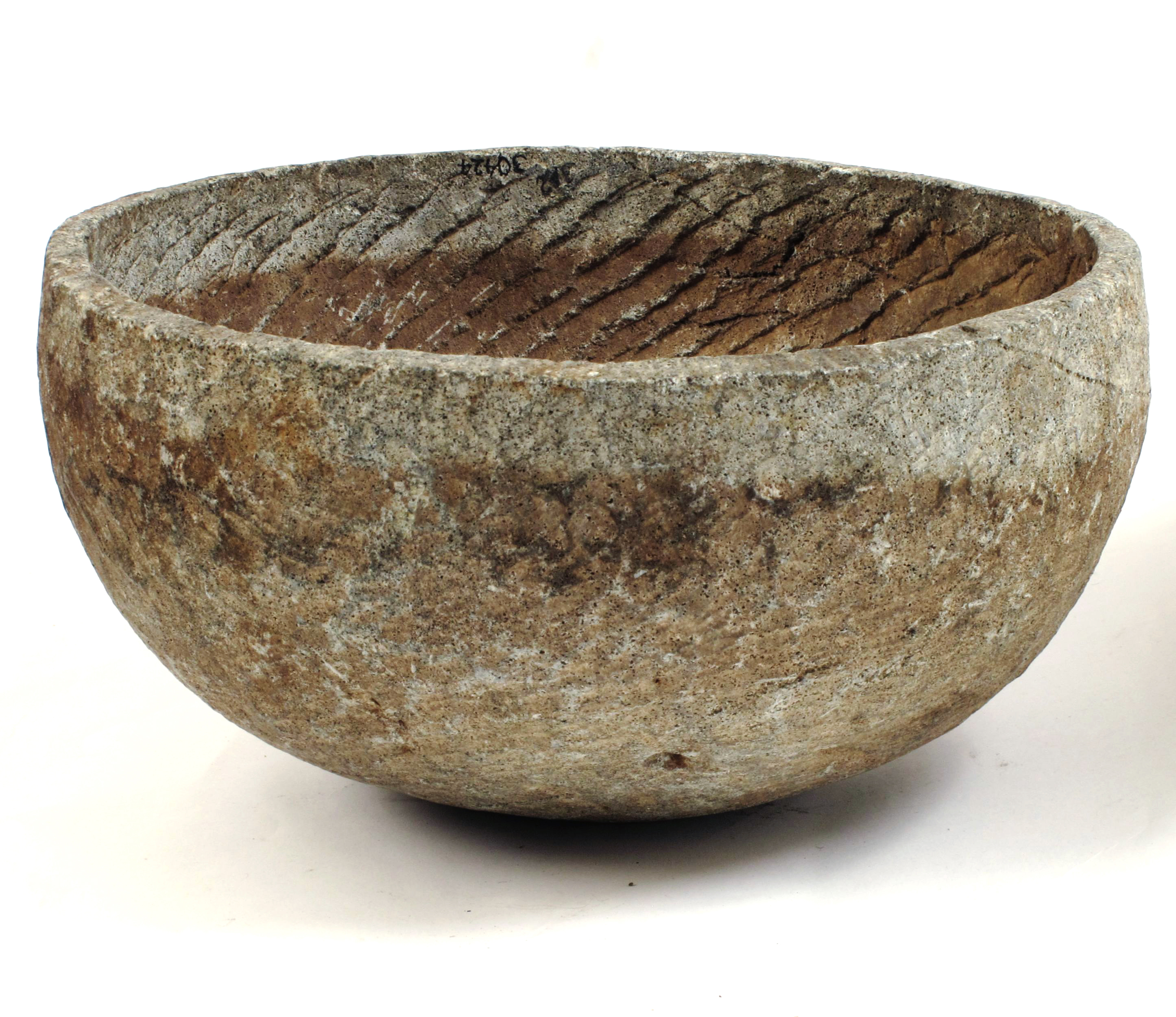 Klebersteinskar, funnet i Frolandselva, trolig mistet under transport på elveisen, underveis fra steinbrudd til utskiping ved kysten.